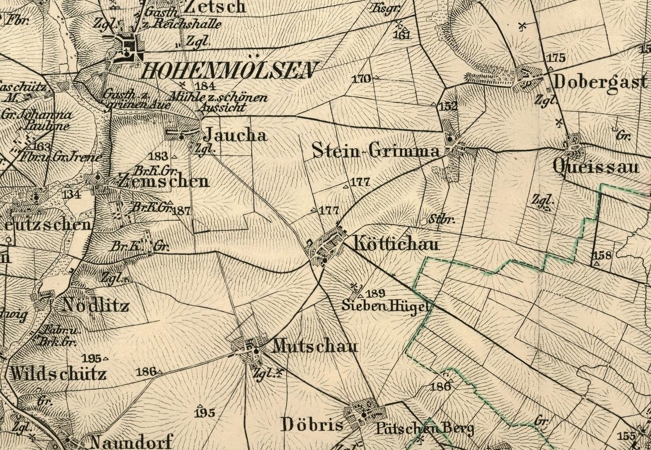 Lage Siebenhügel Köttichau bei Hohenmölsen